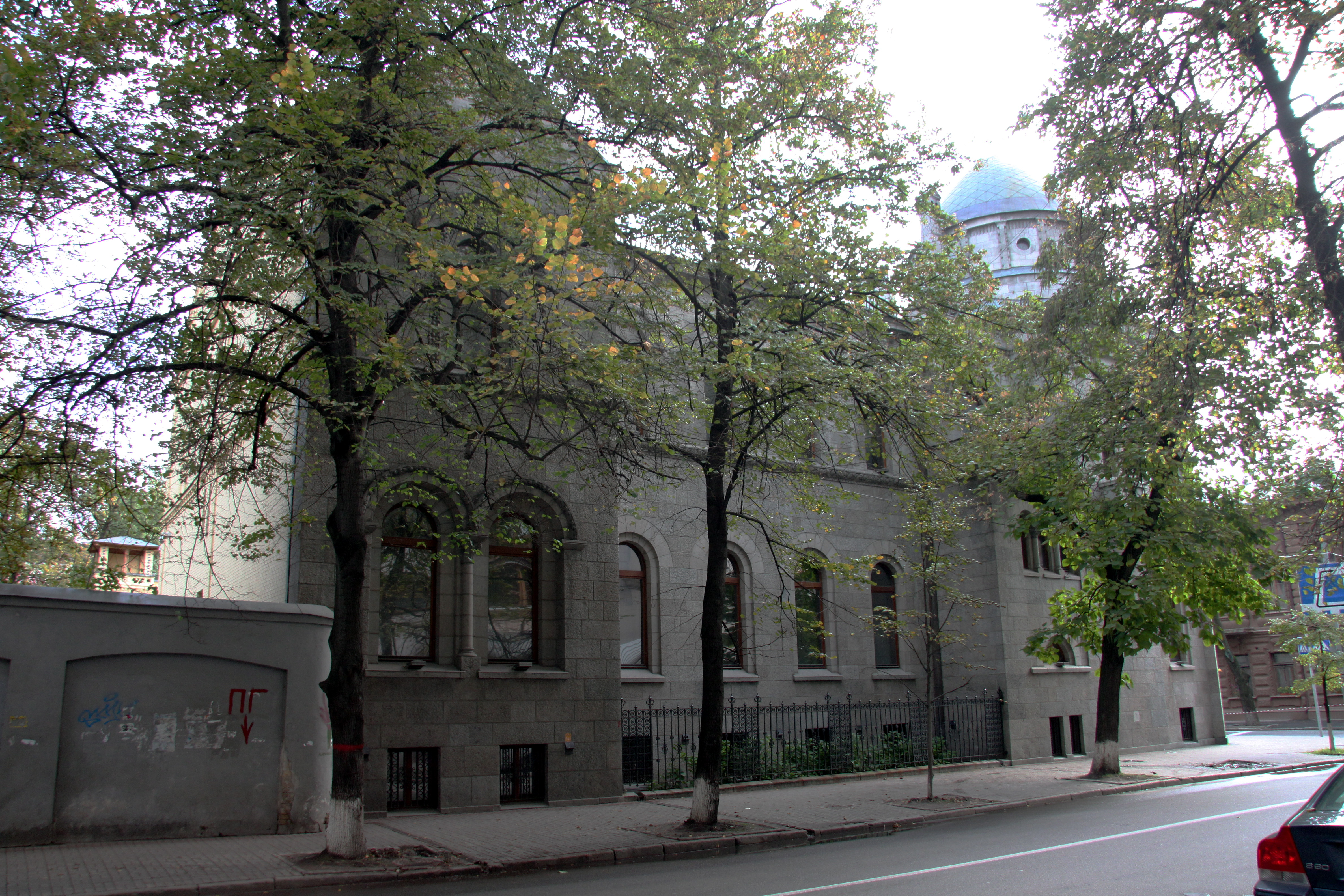 Особняк Ковалевського, Київ, Орлика Пилипа вул., 1/15